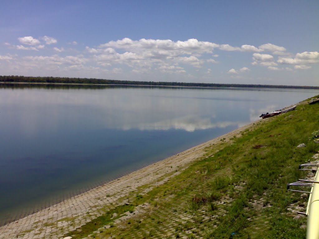 ਪੰਜਾਬੀ: BAHUT HI SONA PIND